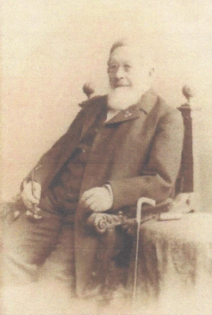 Fotografie von Heinrich Kleffel (1811-1896)